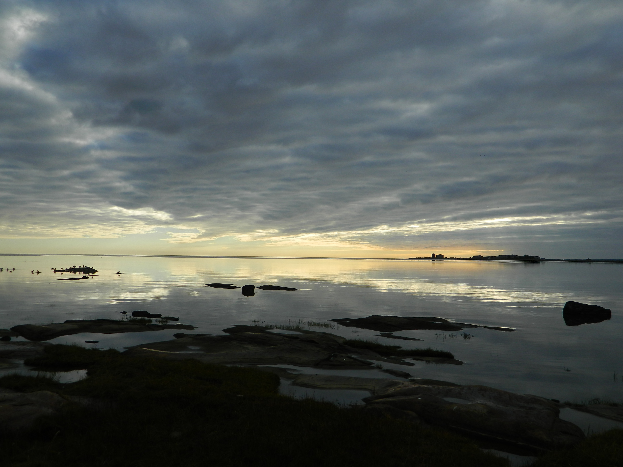 Берег Белого моря около Беломорска